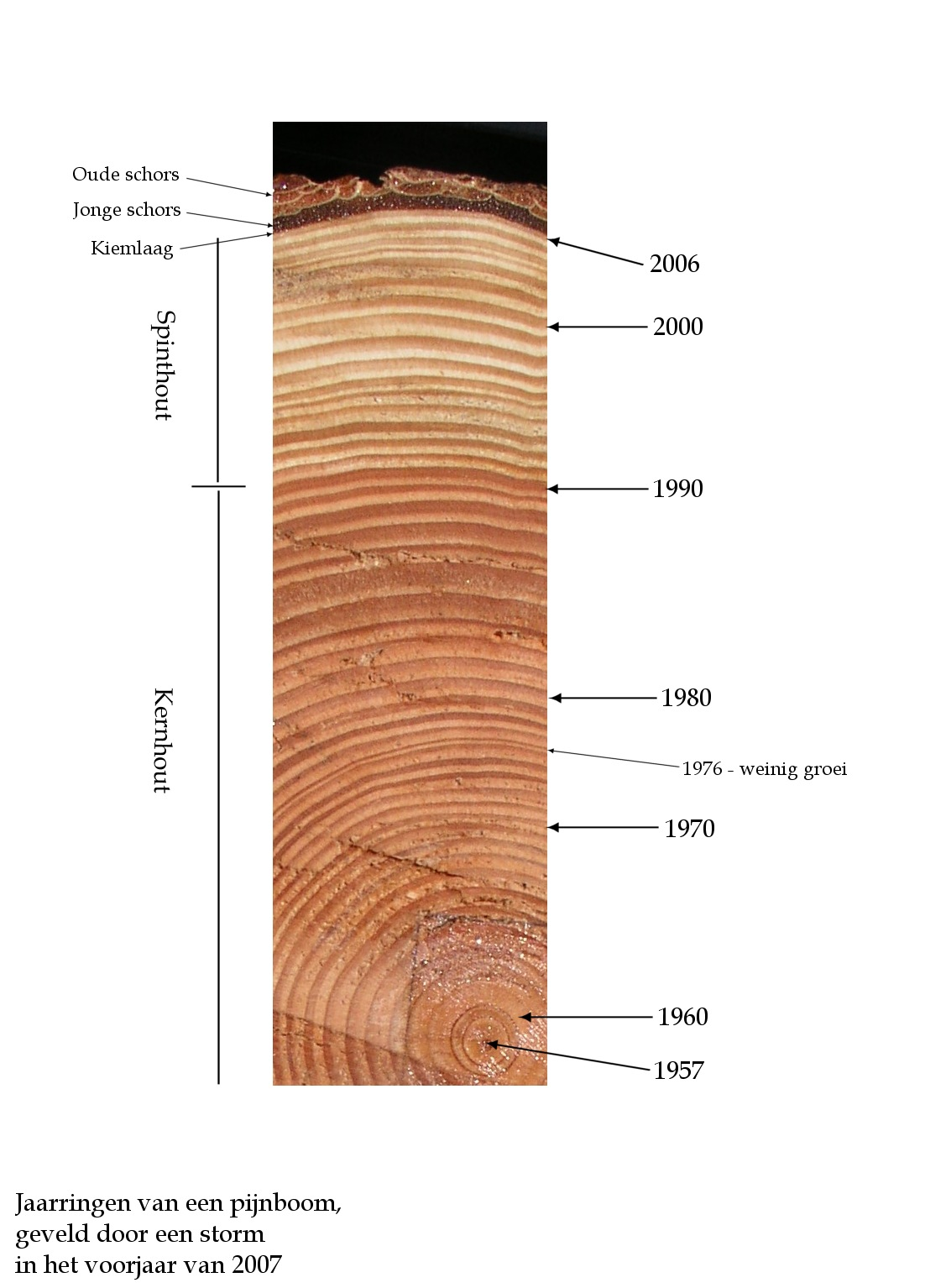 Foto van een doorsnee van een pijnboom in Nunspeet die in de storm in het vroege voorjaar van 2007 is omgewaaid, voor het nieuwe groeiseizoen begon. De jaarringen zijn bijzonder duidelijk. De lichte banden zijn lente- en zomergroei, de donkere herfstgroei. Diverse aspecten van de doorsnee zijn aangegeven, evenals het eerste en laatste jaar en de decadengrenzen. Het jaar 1976 was een uitzonderlijk warm, maar ook droog jaar.